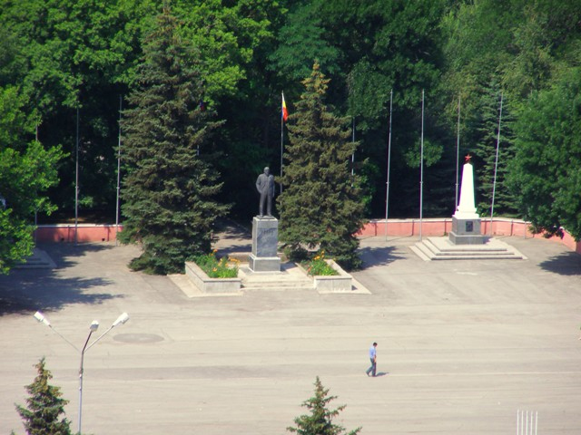 Площадь в Тацинской